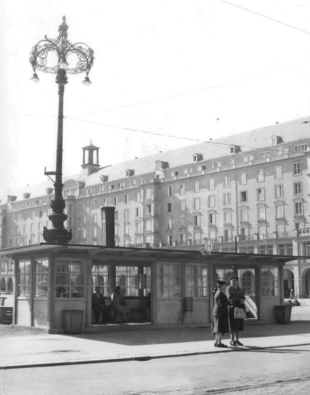 Dresden, Altmarkt, Neubauten Zentralbild Zühlsdorf 18.10.1956 Das neue Dresden. Der Alte Markt. (Aufnahme September 1956)